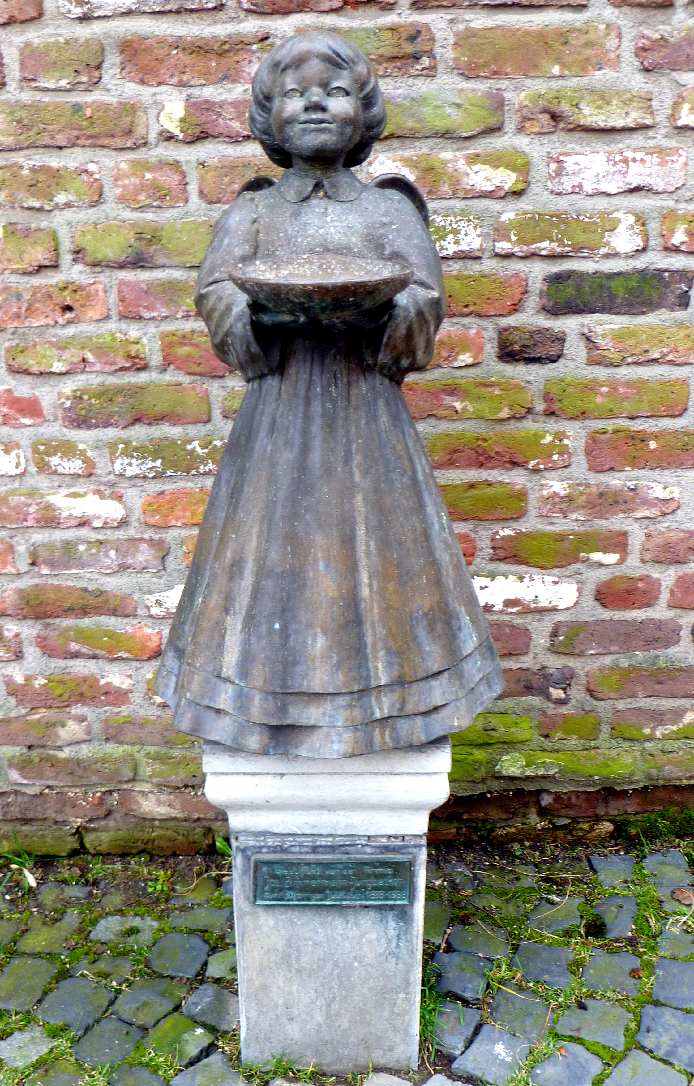 Skulptur Streuengelche an der Roskapelle in Aachen, Baujahr 1988, Bildhauer Gerhard Hensen